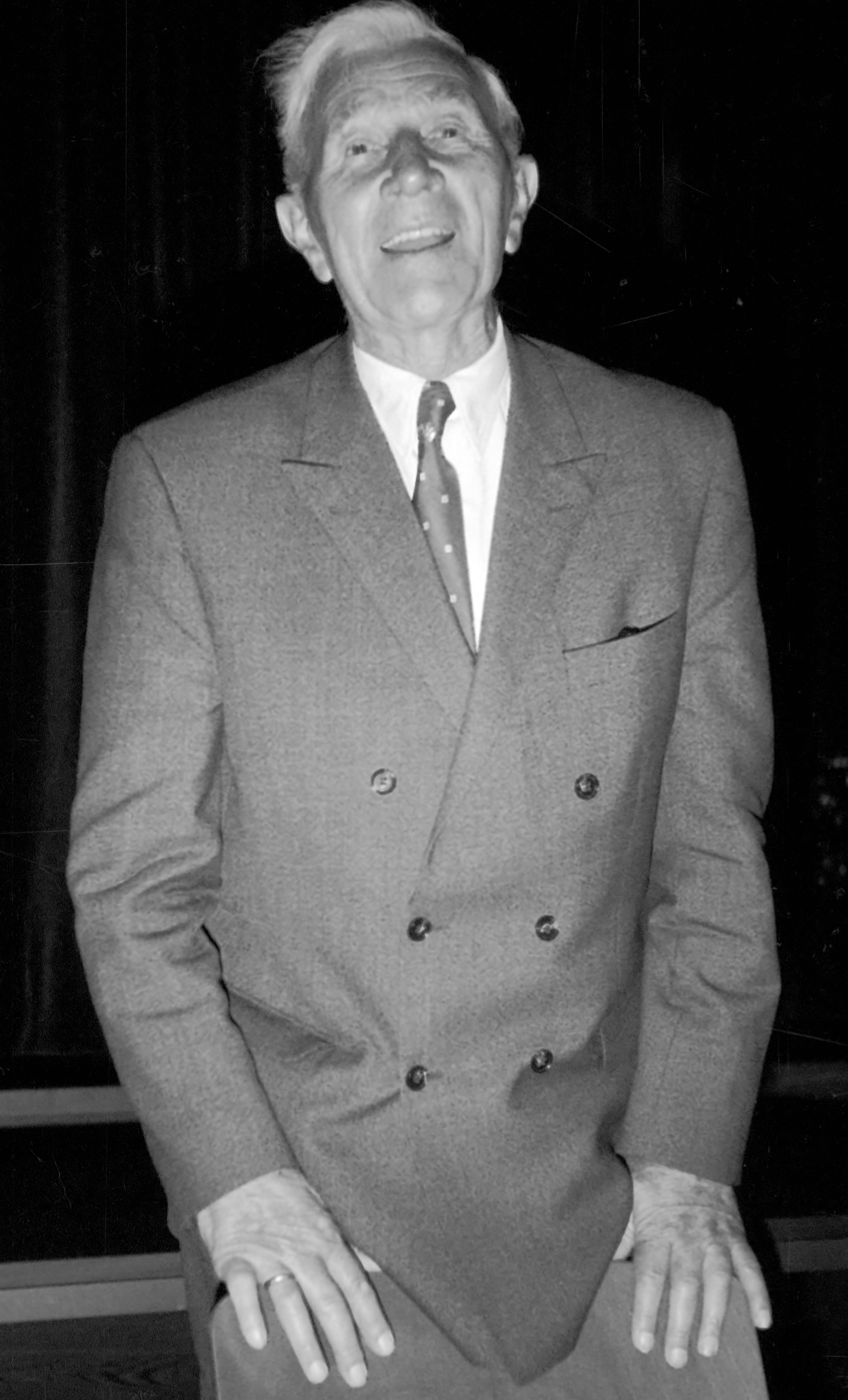 Rudolf Kinau erzählt plattdeutsche Geschichten